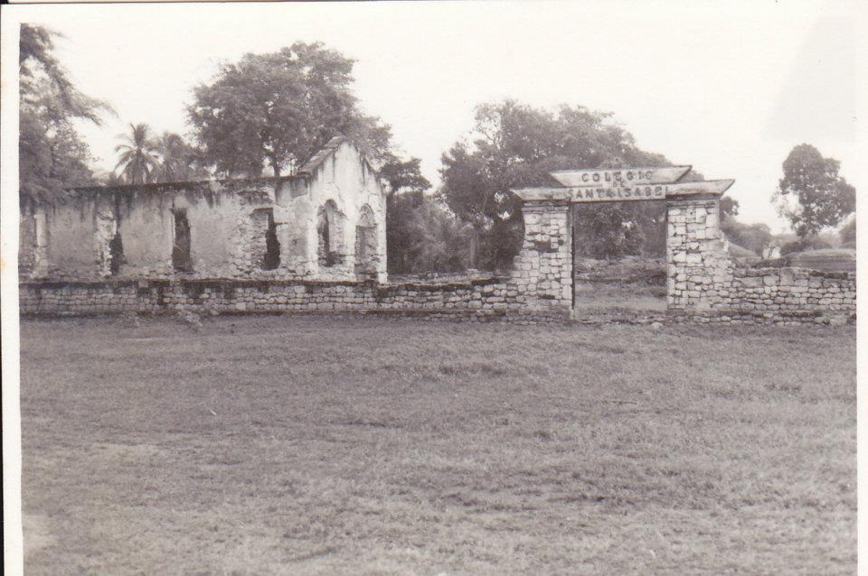 Ruínas do Colégio de Santa Isabel.Presentemente nada existe